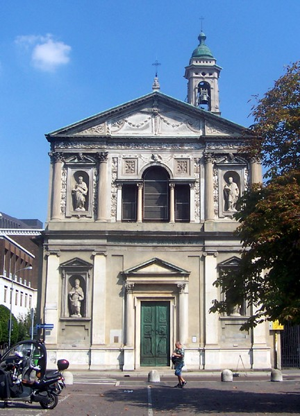 Milano - Chiesa dei Ss. Barnaba e Paolo